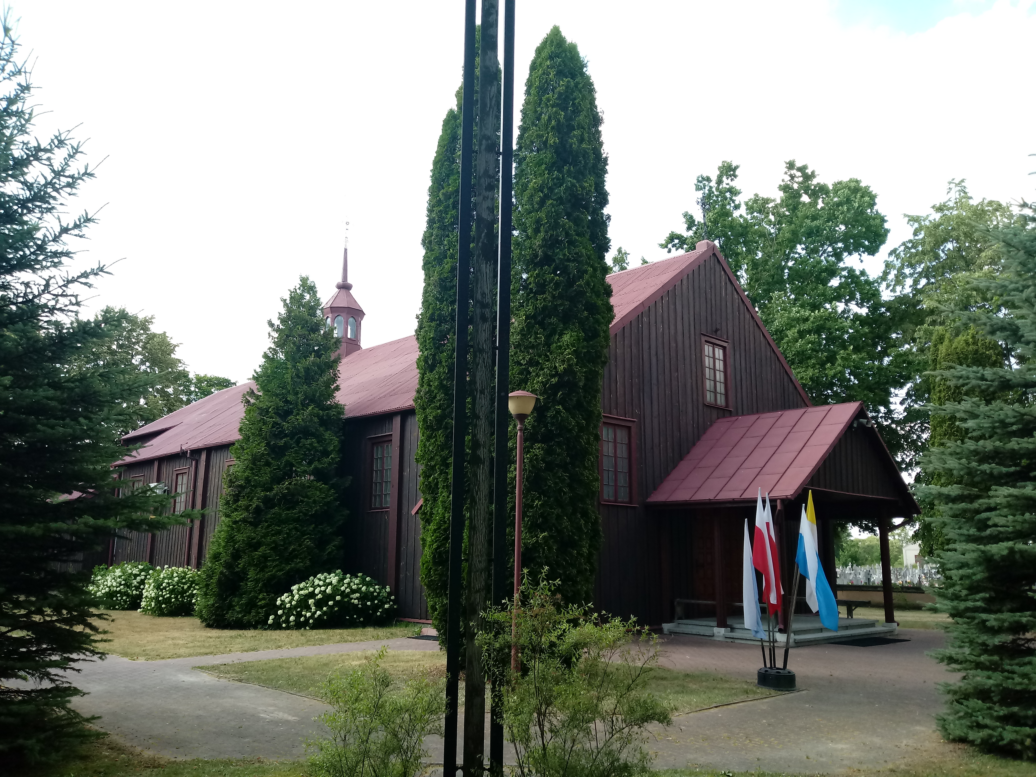 Parafia pw. Matki Boskiej Szkaplerznej została erygowana 1974 roku.